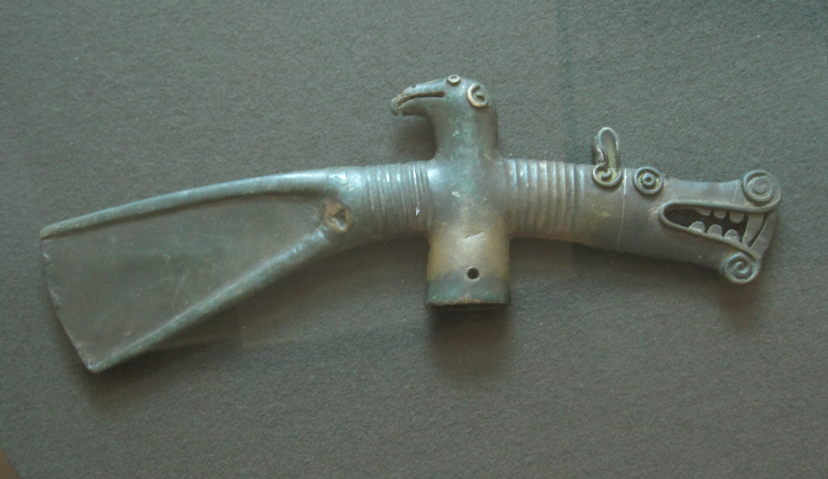 Секира. Бронза. Ананьинская культура. VII-V вв. до н.э. Национальный музей Республики Татарстан